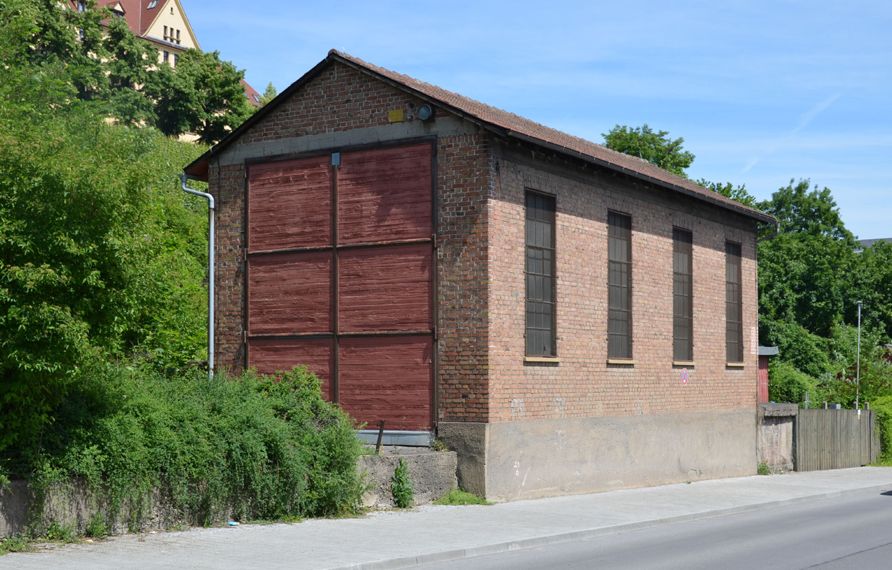 Lokschuppen der früheren Industriebahn Münster–Cannstatt an der Haldenstraße.